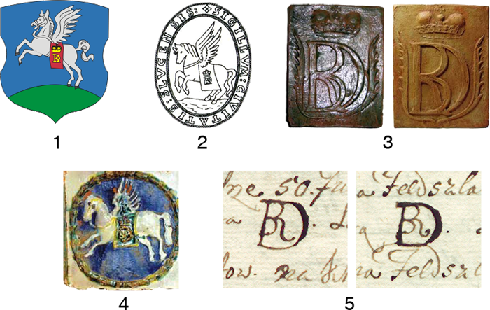 Беларуская (тарашкевіца): 1. Сучасны герб Слуцка. 2. Перамалёўка пячаткі слуцкага магістрата другой паловы XVII-XVIII ст. 3. Паліваная і непаліваная кафля з Біржанскага замку, 1660-я гг. 4. Кафля са слуцкага Верхняга замку, 1650-1660-я гг. 5. Выява манаграмы Б. Радзівіла з інвентара гармат Слуцкай фартэцыі 1705 г.